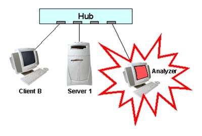 Монгол: Зураг №1